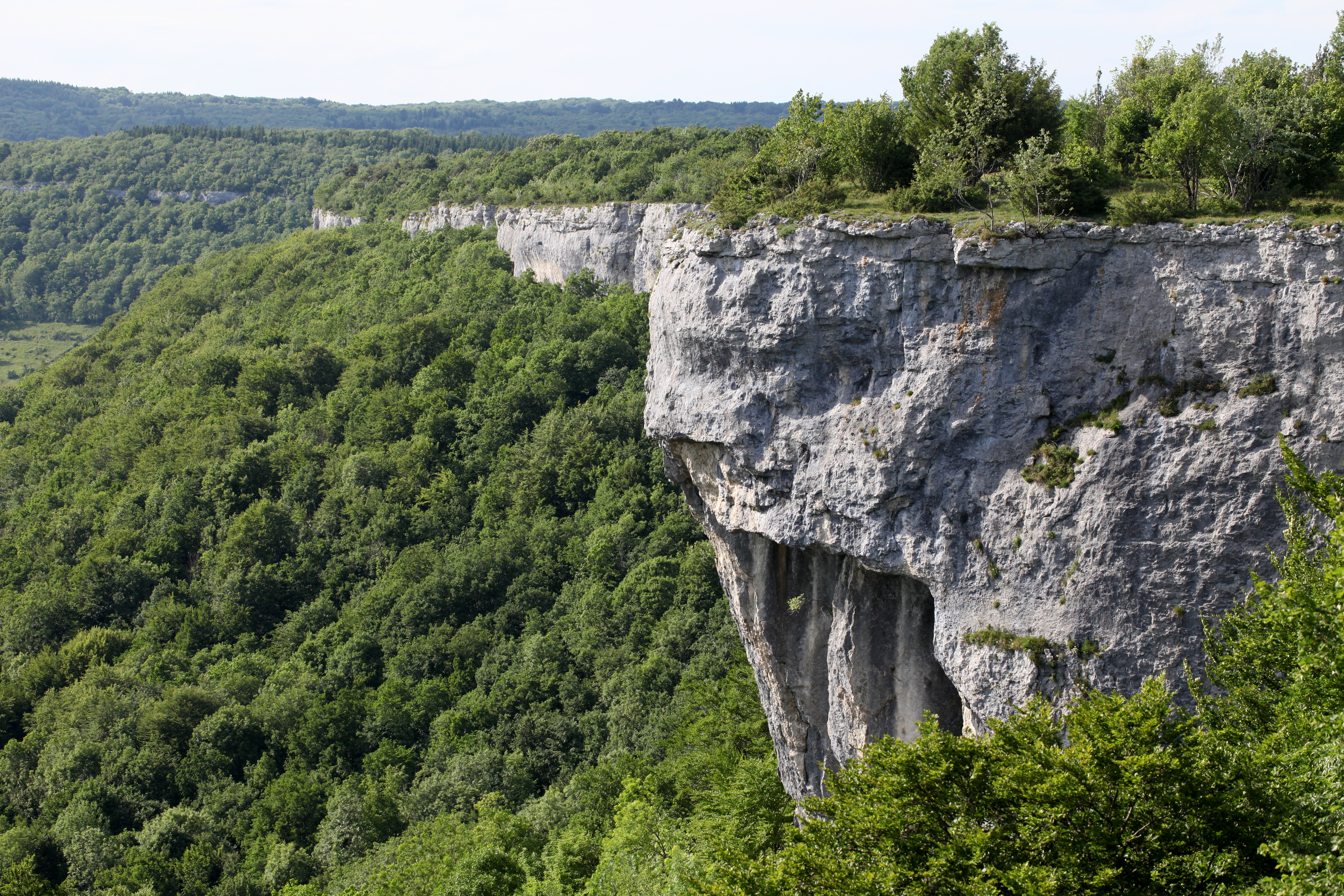 Une partie de la corniche calcaire du ravin de Valbois